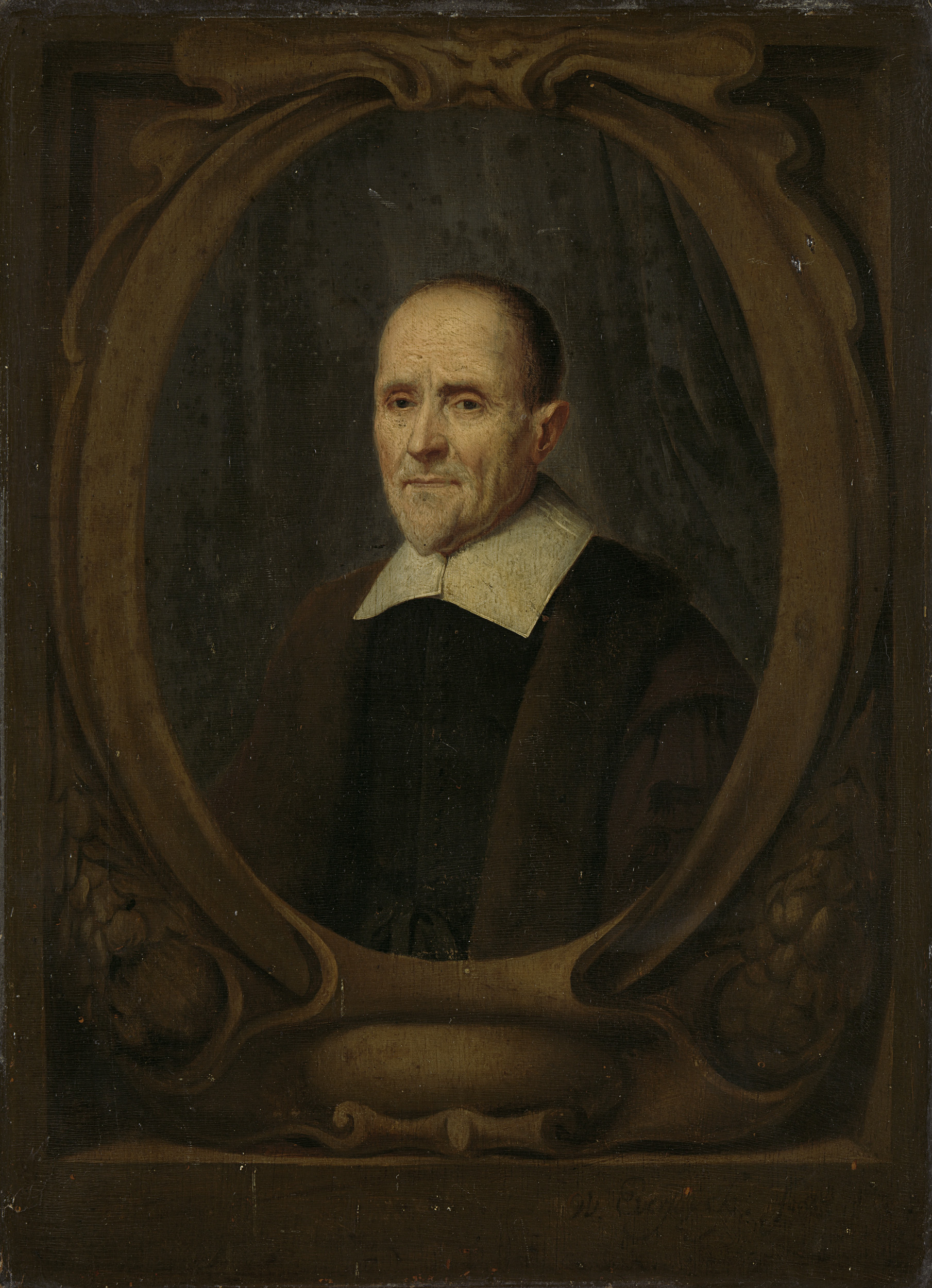 Portret van Cornelis Fransz Eversdijck, wiskundige en rekenmeester van Zeeland en achterneef van de schilder. Buste naar links in een ovaal.